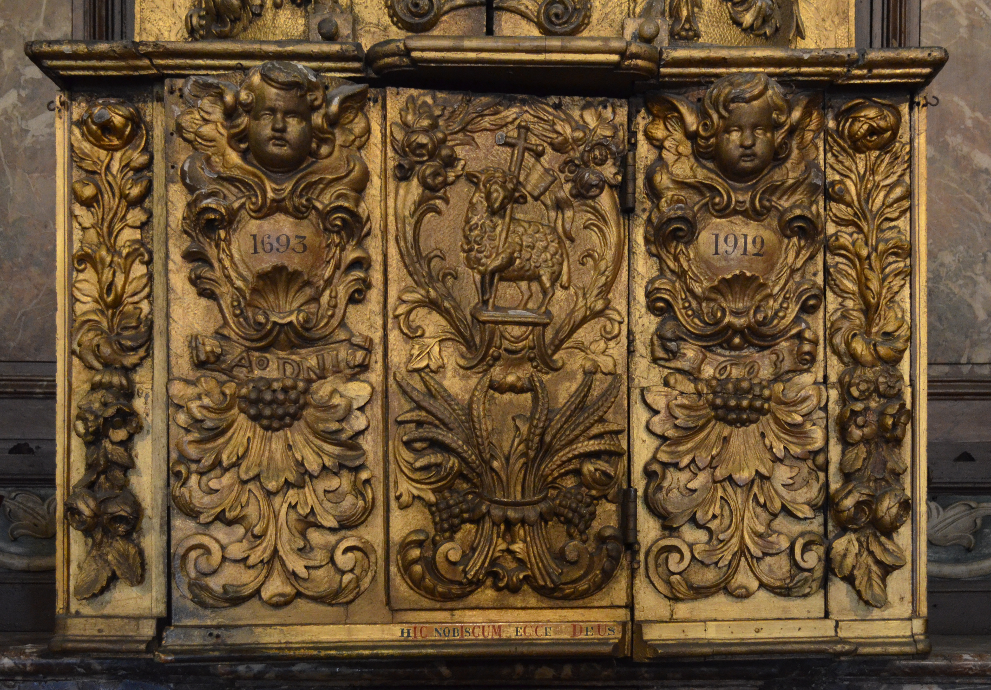 Charleroi - Église Saint-Christophe - Ancien chœur et autel baroque. Chronogramme : hIC nobIsCUM eCCe DeUs (1912).